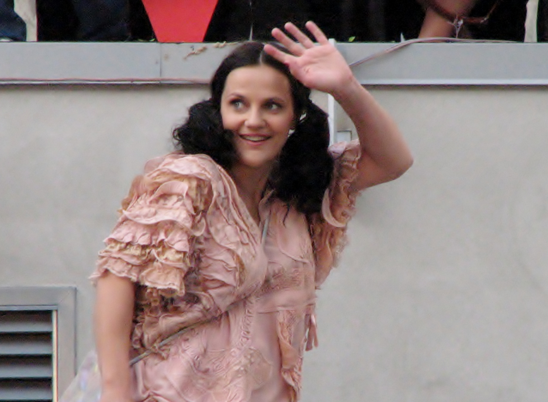 Hele Kõrve Tallinna Linnateatri 48. hooaja avamisel